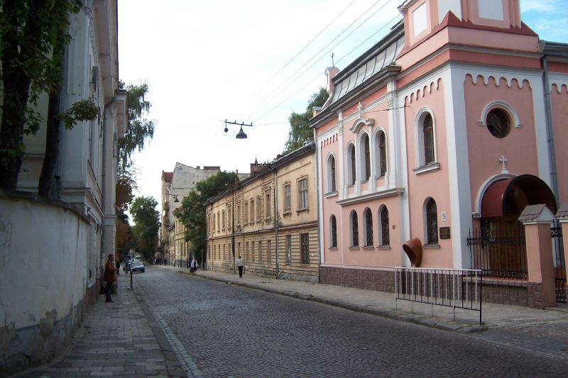 Вулиця Пекарська у Львові біля церкви Христа-Спасителя (буд. № 59)